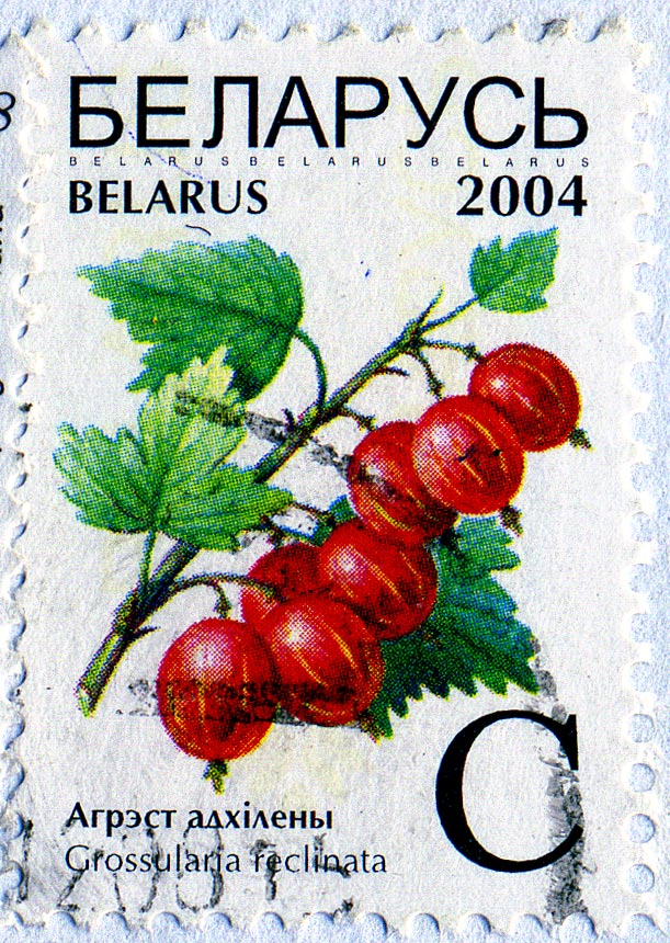 Почтовая марка Белоруссии. 2004. Крыжовник